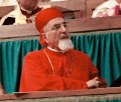 Le patriarche Paul Pierre Méouchi lors d'une séance du concile Vatican II. SEE THE TALK PAGE: this picture doesn't represent Melkite patriarch Maximos IV Sayegh but Maronite patriarch Paul Peter Meouchi